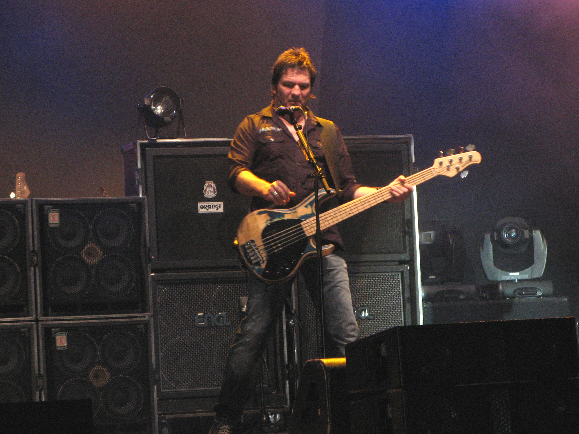 Marc Lynn, Bassist von Gotthard. Aufgenommen am Radio Argovia Fäscht 2010 beim Flugplatz Birrfeld in Lupfig.